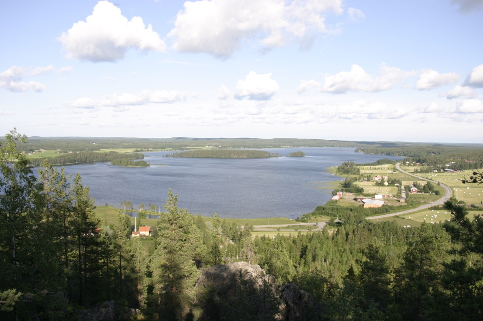 En vy över långviksvallen och Tavelsjön, tagen från berget Vallberget